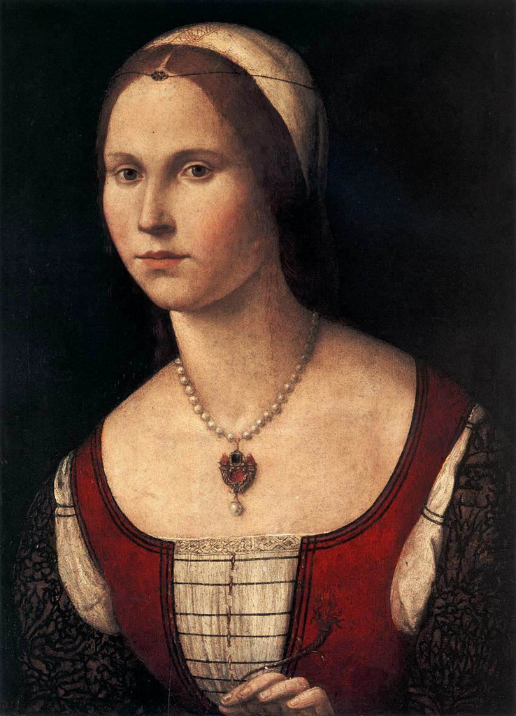 Vittore Carpaccio - Ritratto femminile olio su tavola 57 x 44 cm Collezione privata